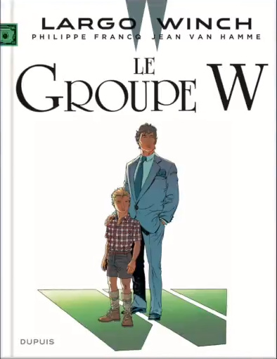 Couverture d'un des albums de Largo Winch (bande dessinée)